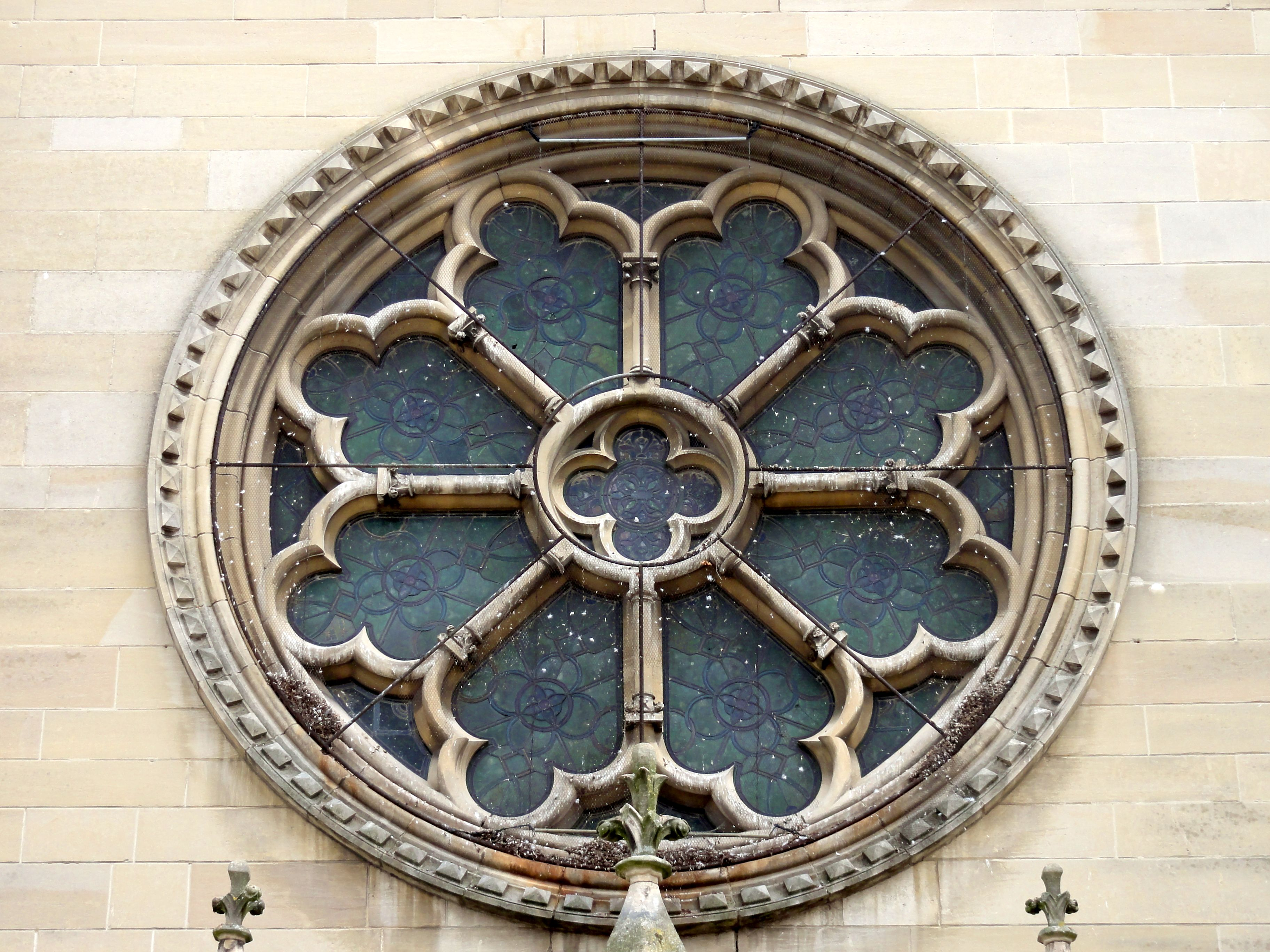 Rosace occidentale de la nef.